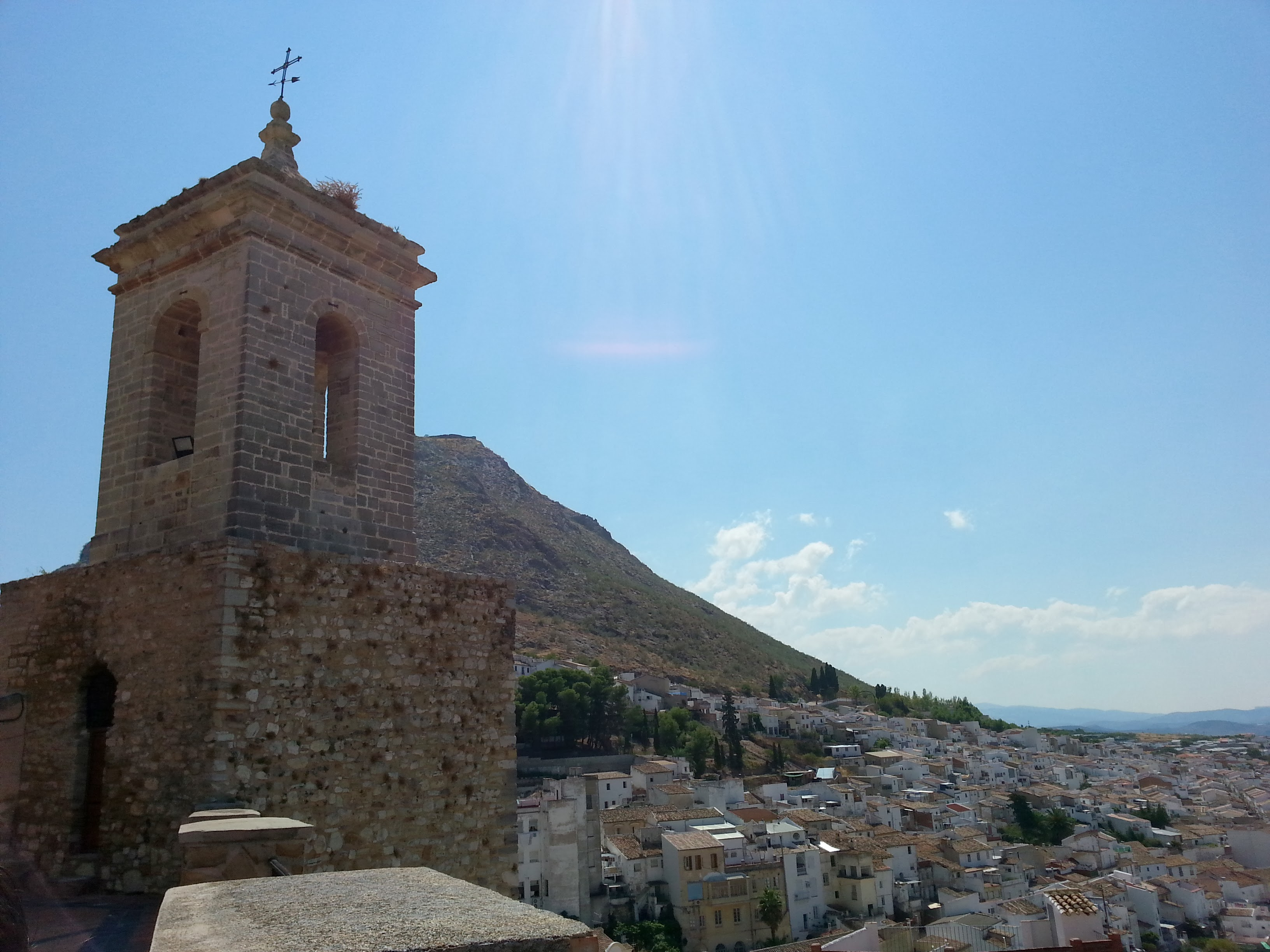 Torre-campanario del Santuario de la Virgen de la Villa en Martos, Jaén (España).